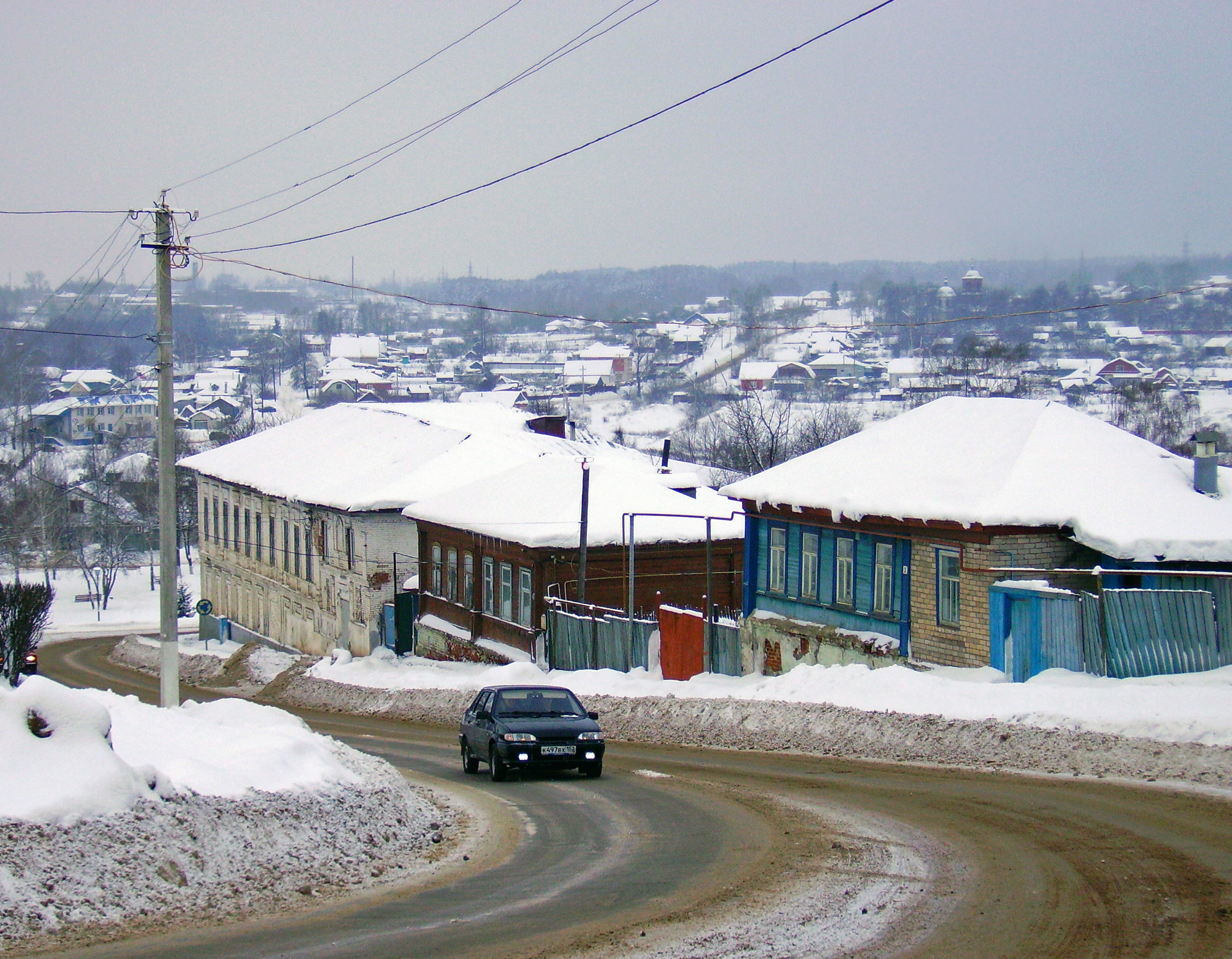 Сергач. Начало улицы Советской